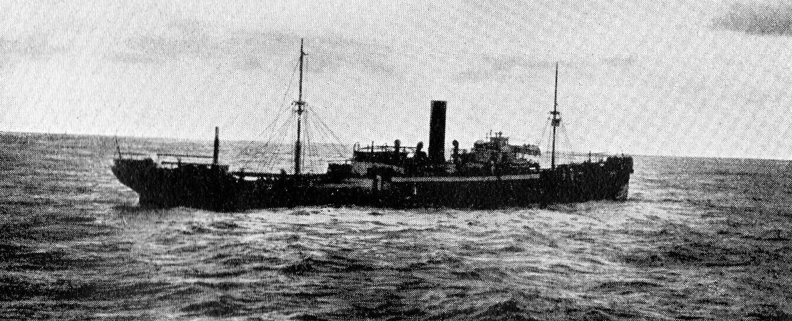 Hilfskreuzer LEOPARD, früherer britischer Handelsdampfer YARROWDALE